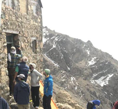 آخرین مرحله بازسازی با نصب در جدید پناهگاه دایان یافت.